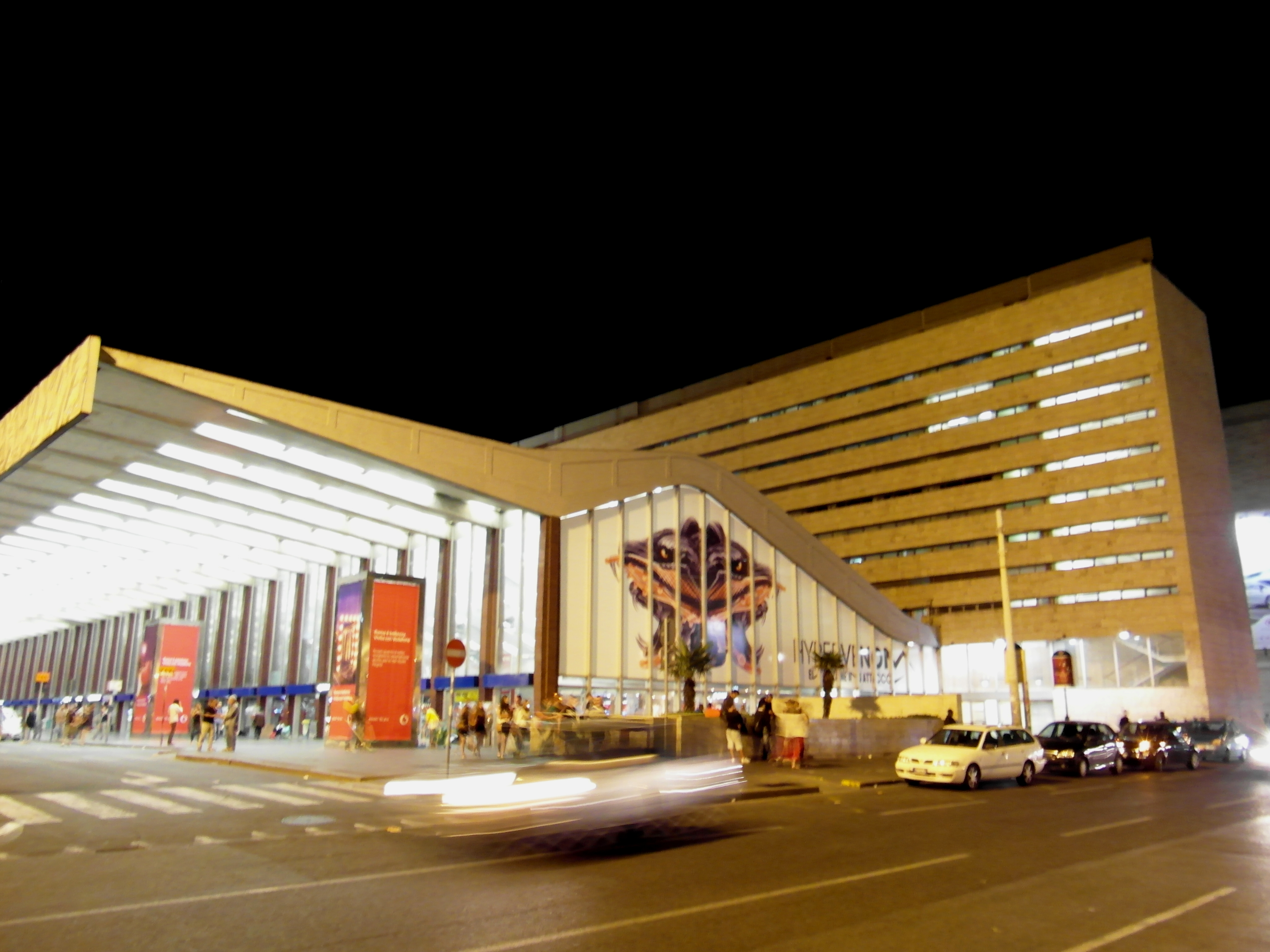 Stazione di Roma Termini Roma Termini railway station Bahnhof Roma Termini